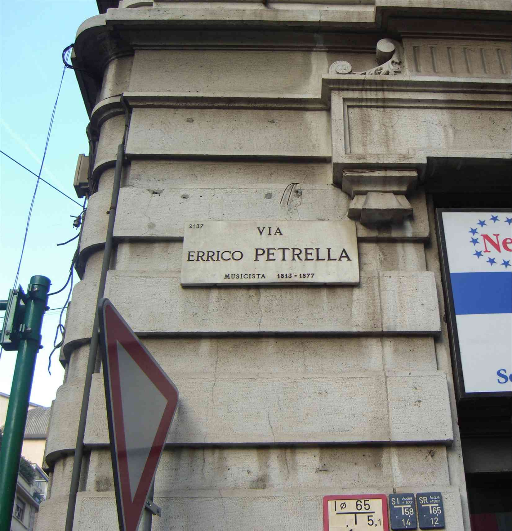 MI Milano via Errico Petrella (1813-1877) musicista targa stradale